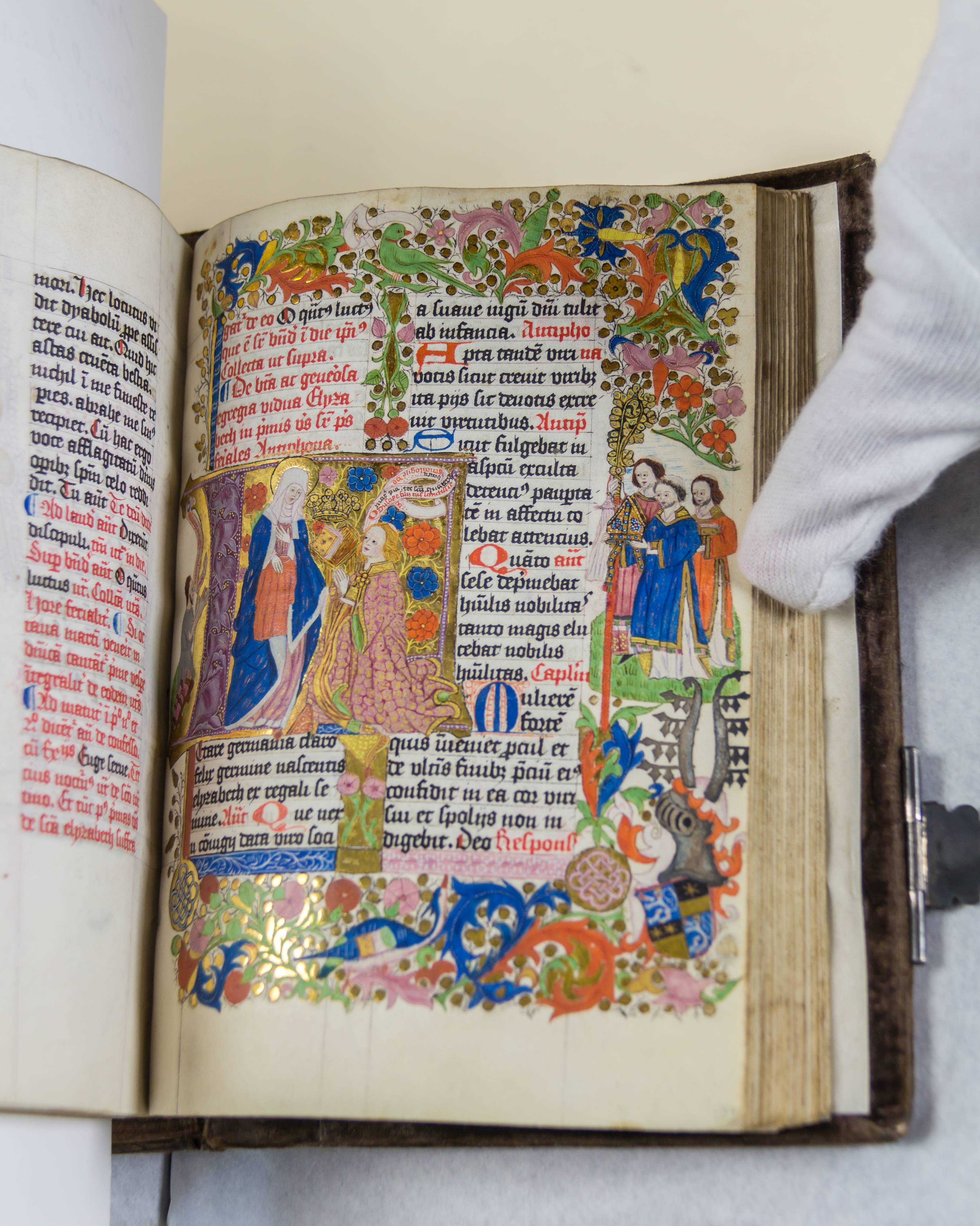 Pressekonferenz im RDZ des Historischen Archivs der Stadt Köln zum Erwerb des Breviers (Sommerteil) (Scans im digitalen Historischen Archiv) des Erzbischofs Hermann von Hessen Foto: Miniatur: Der Stifter kniet vor der hl. Elisabeth. Unten rechts das Wappen des Erzbischofs Hermann von Hessen